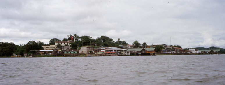 Vista de San Carlos desde el lago Nicaragua